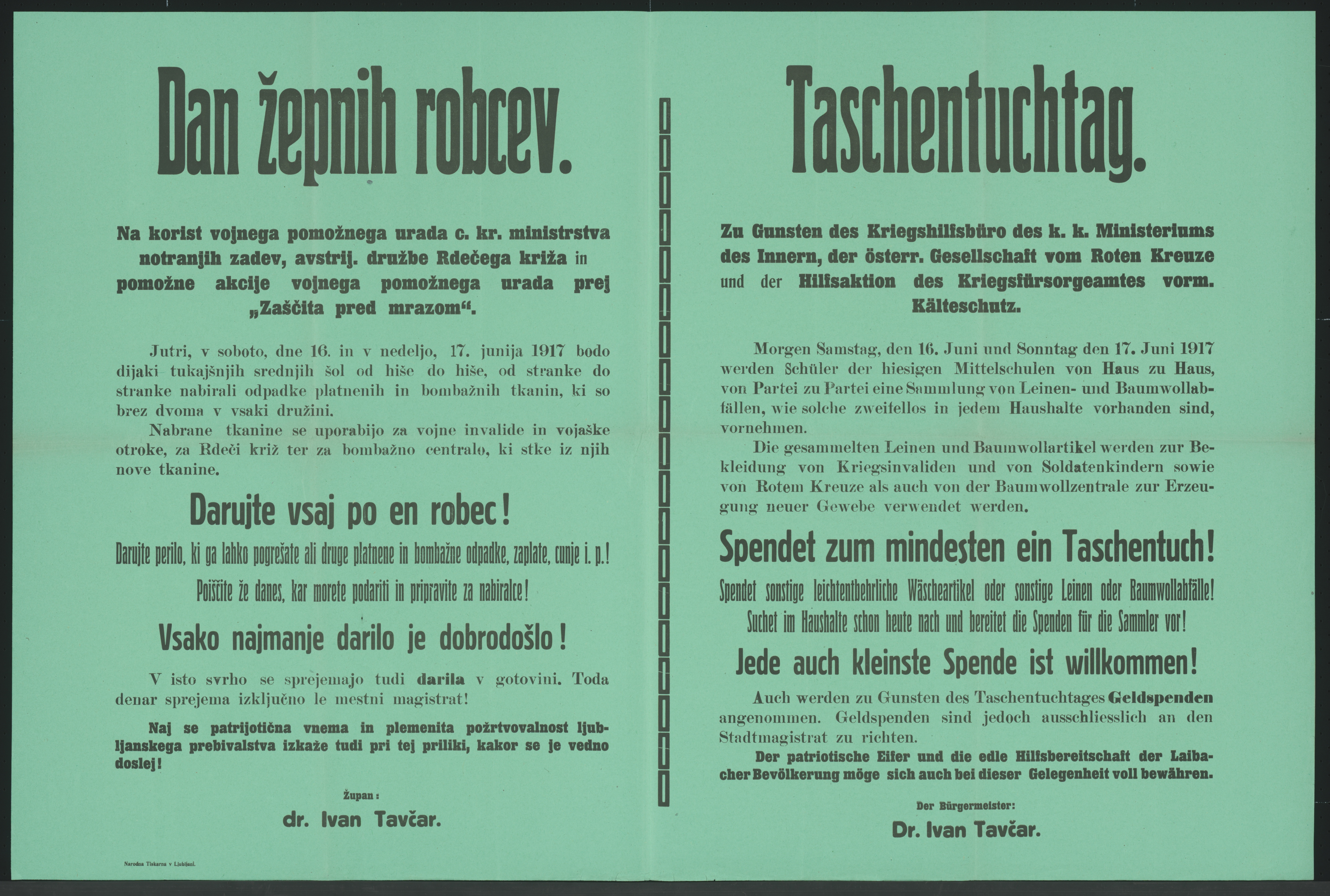 Taschentuchtag - Laibach - Mehrsprachiges Plakat.